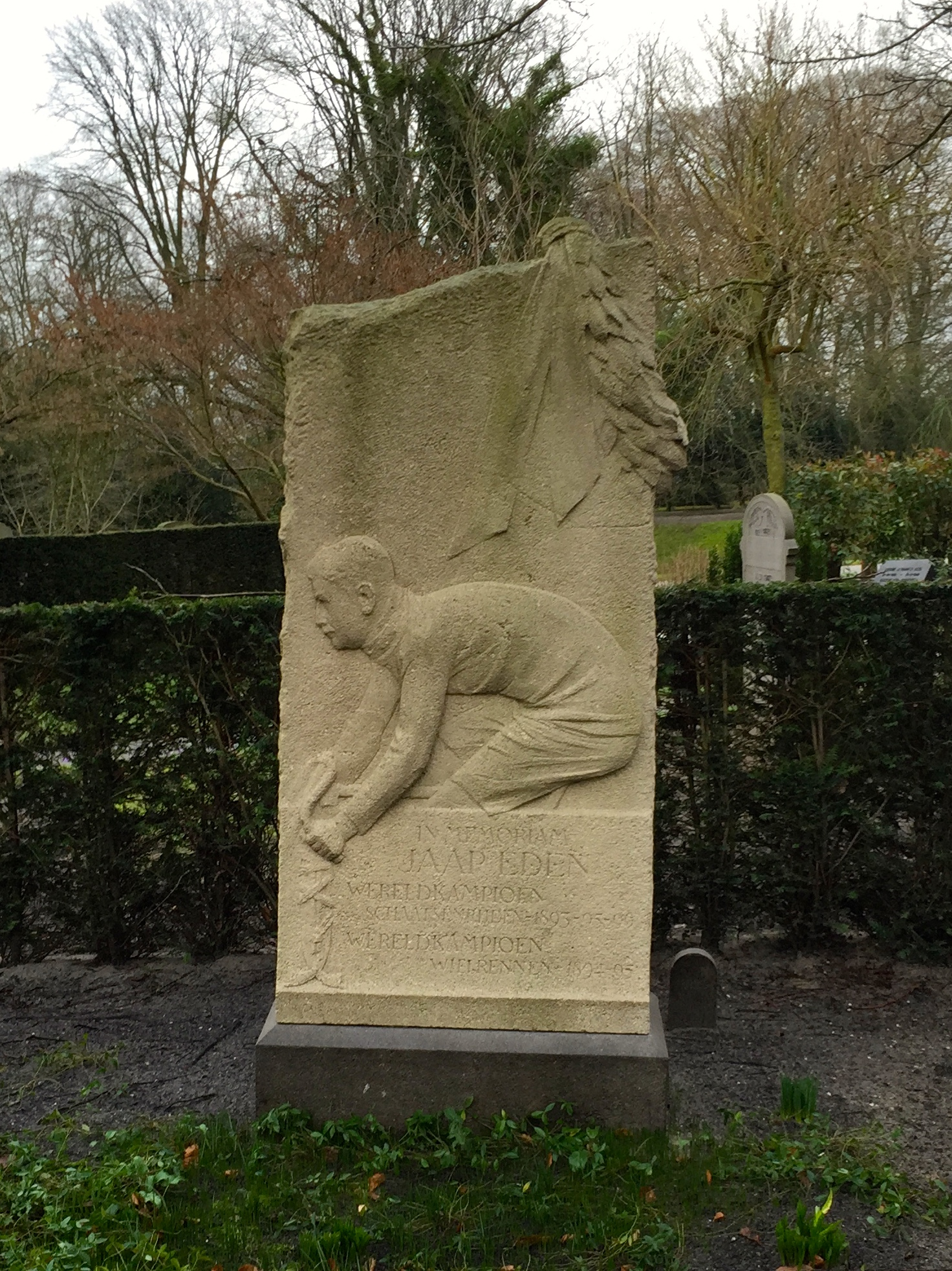 Grafsteen Jaap Eden